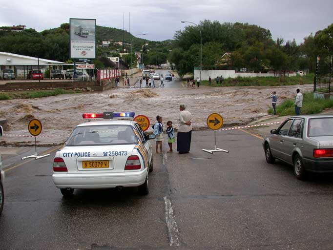 Klein Windhoek River Windhoek, Namibia